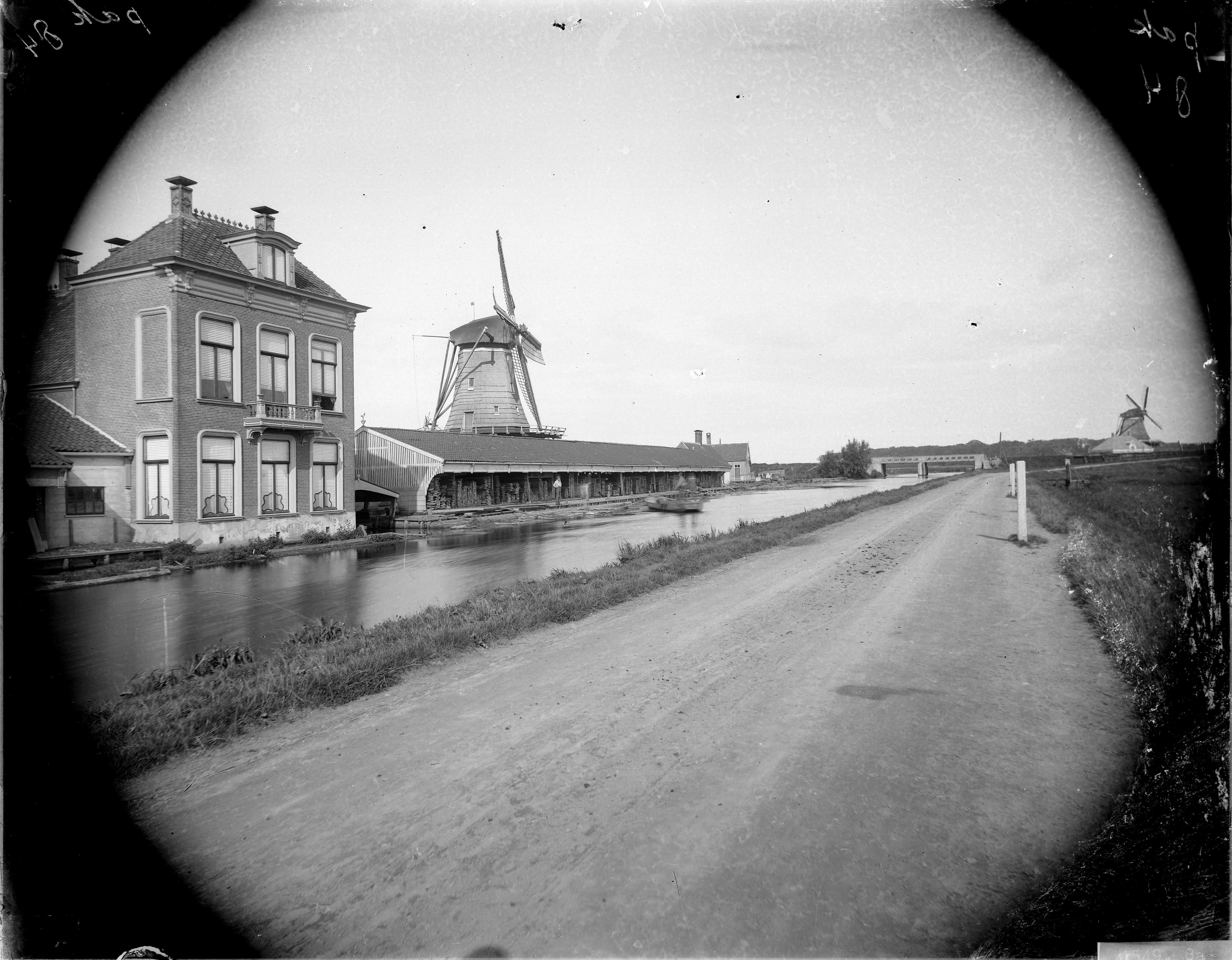 Haarlemmertrekvaart en Haarlemmerweg gezien naar het noorden met links achterzijden van de Maredijk en molen de Hooiberg (gesloopt 1914). Op de achtergrond de spoorbrug in de Lijn Leiden-Haarlem en rechts de molen de Heerder. Bos Oud Poelgeest in het verschiet.